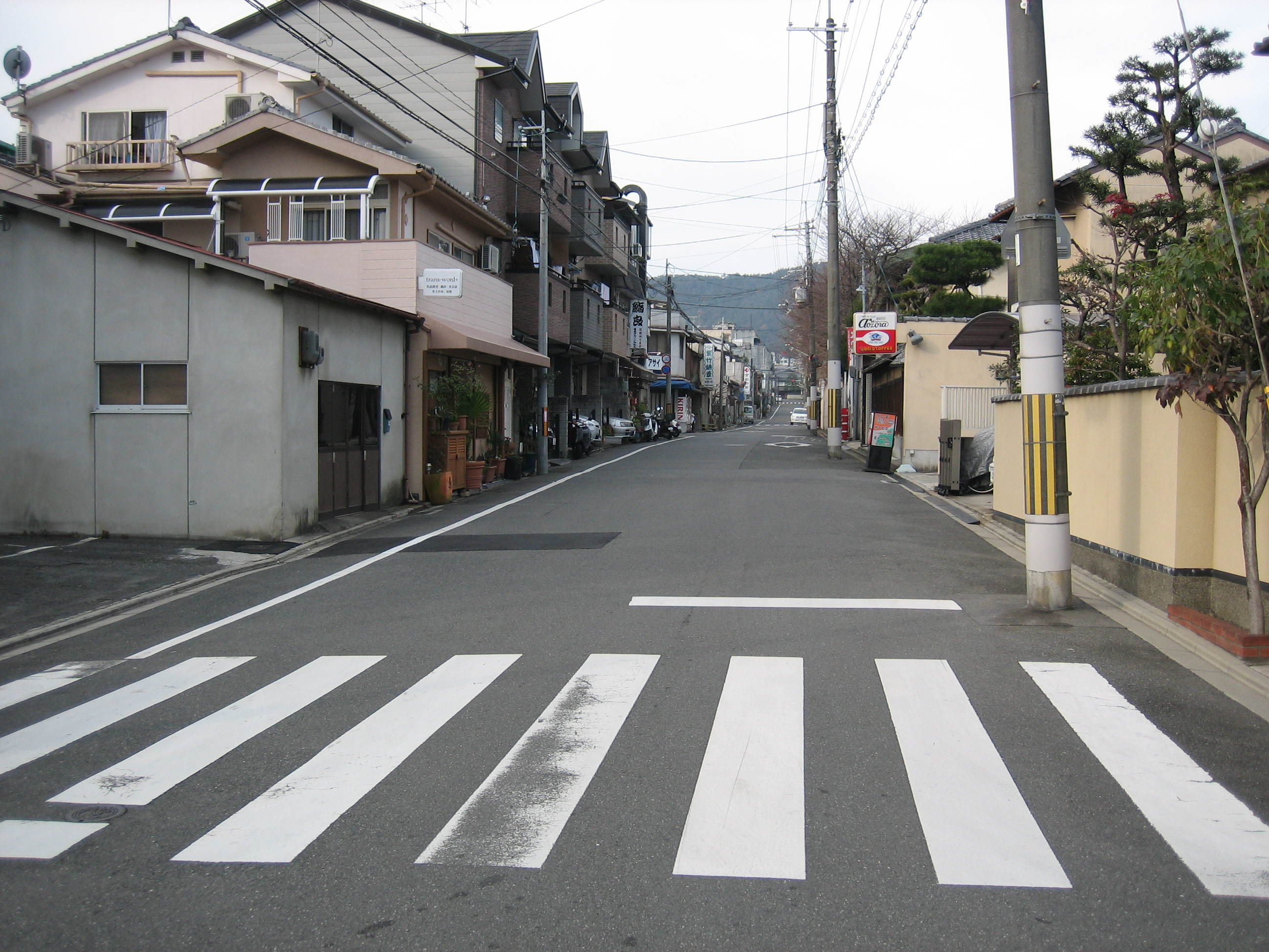 紫竹通を京都市北区紫竹西桃ノ本町で撮影